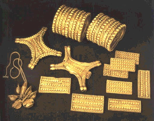 Tesoro del Carambolo de Camas (Sevila)